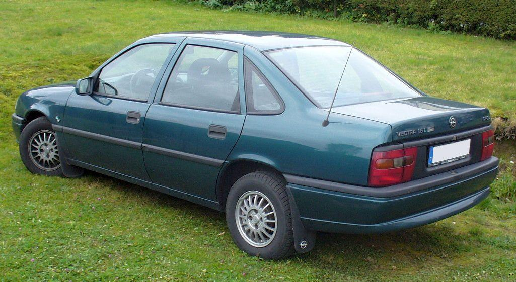 Opel Vectra A